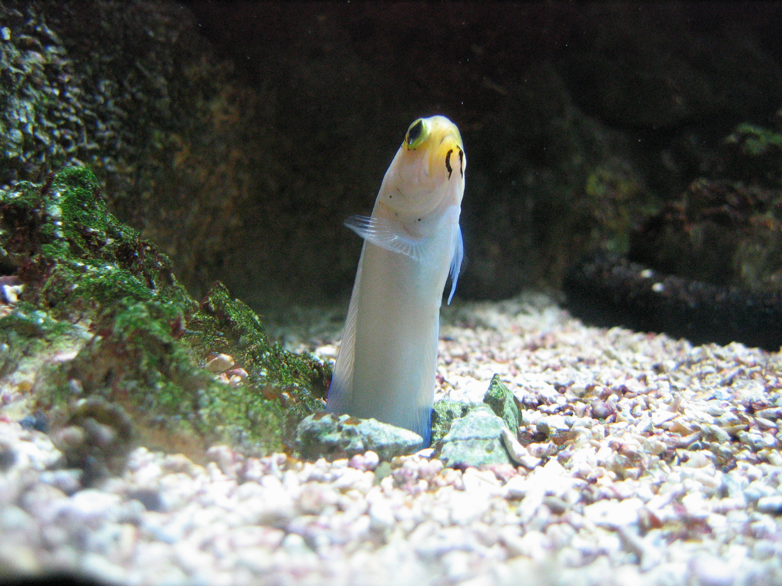 Opistognathus aurifrons aquarium de la porte dorée Paris